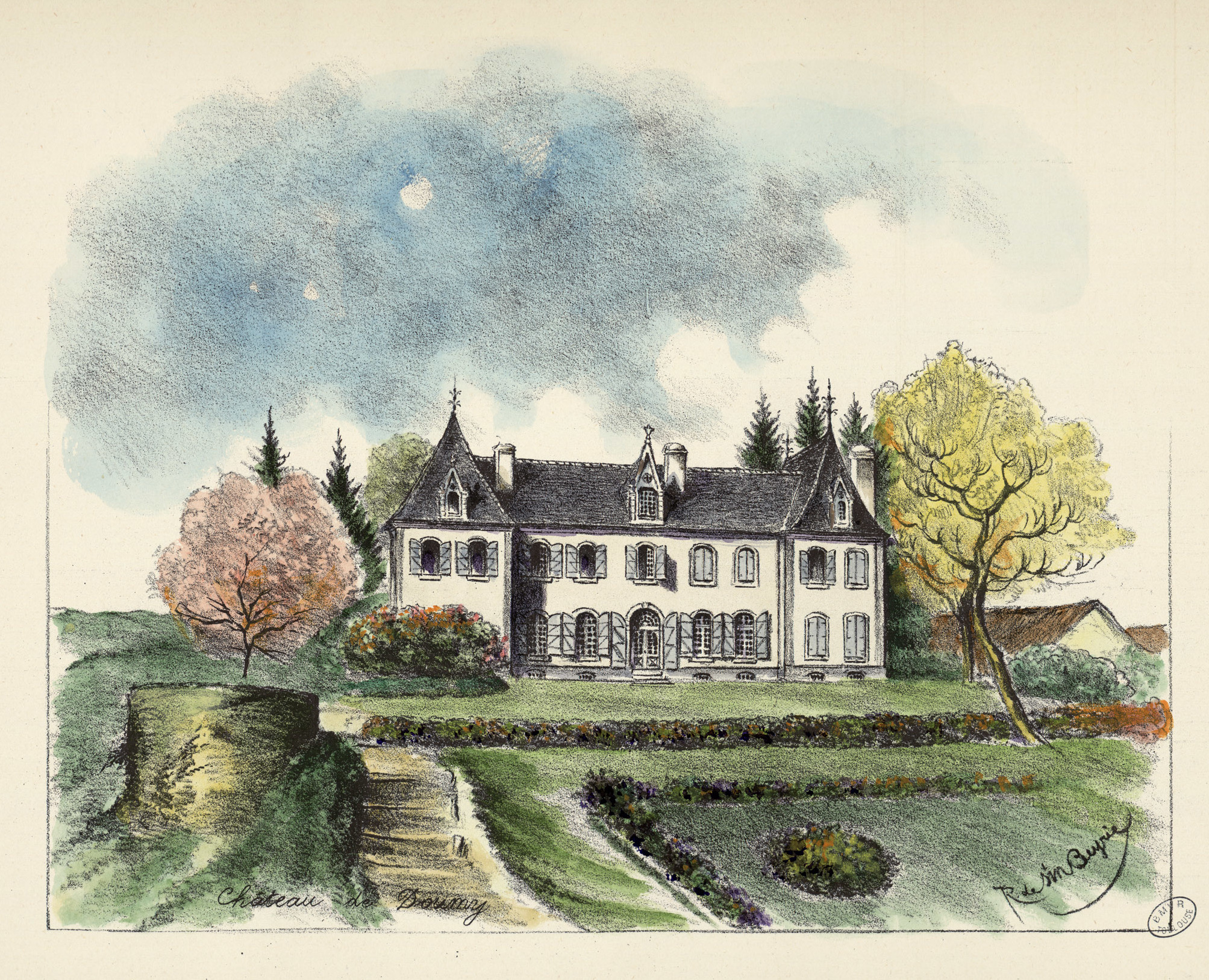 Ancely, René (1876 - 1966). Possesseur